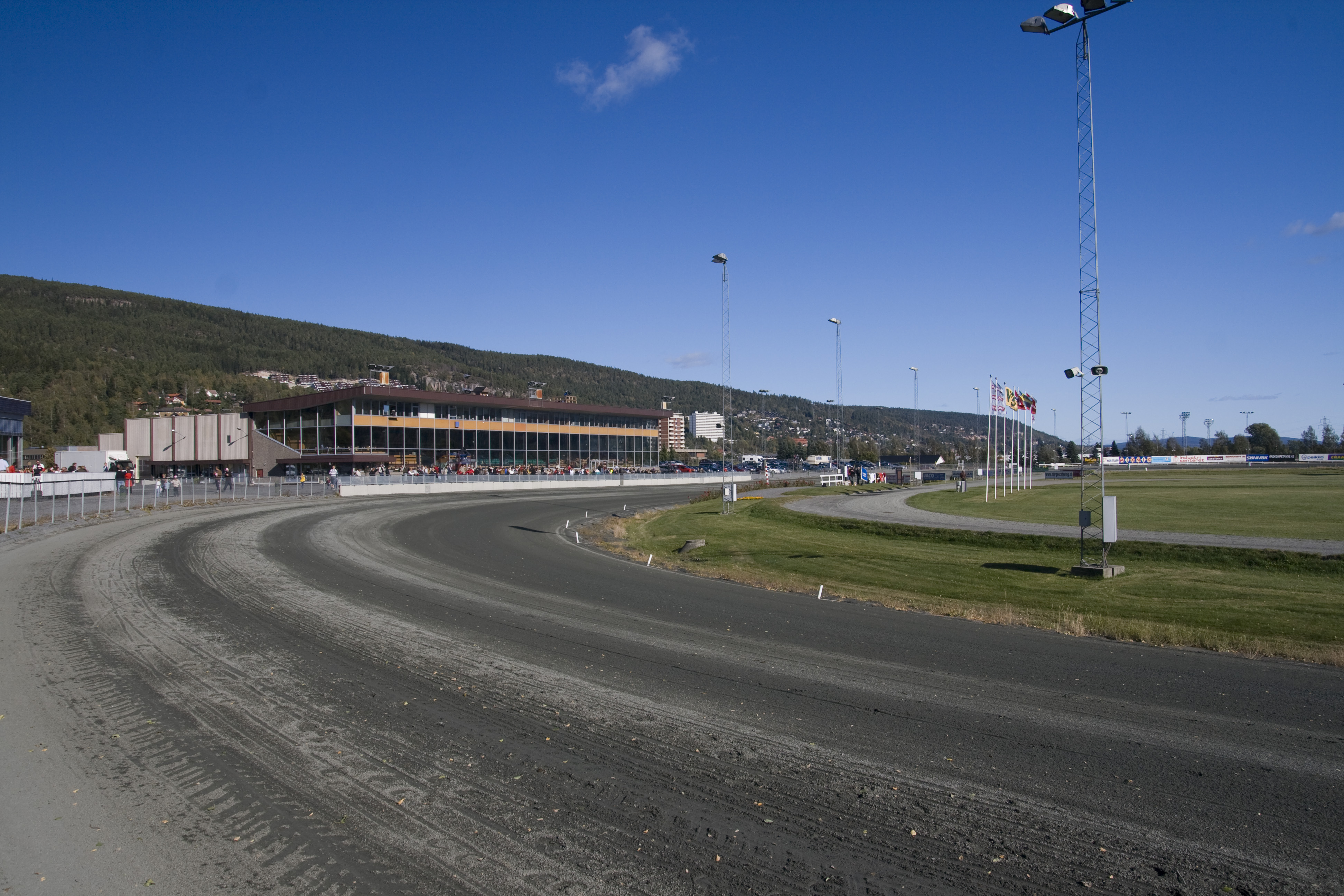 Drammen Travbane